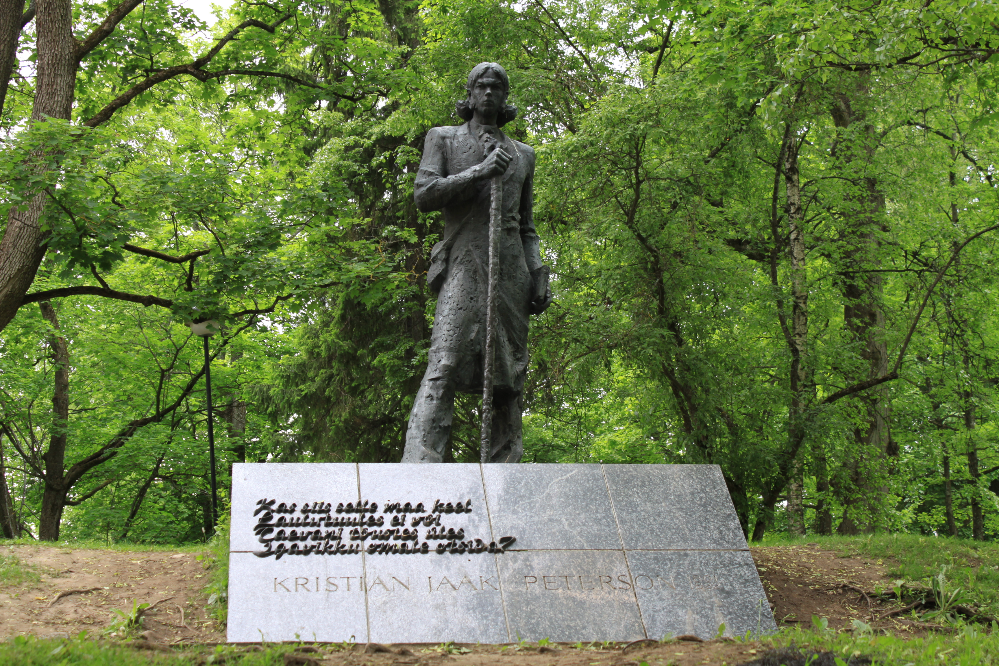 Toomemäe park; Toomemägi, (Toomemäe park (koos Kassitoomega))